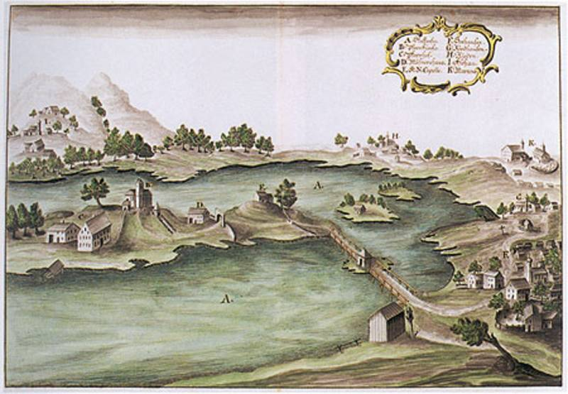 Bild des Staffelsees (Oberbayern) mit Steg über die Jakobsinsel zur Insel Wörth